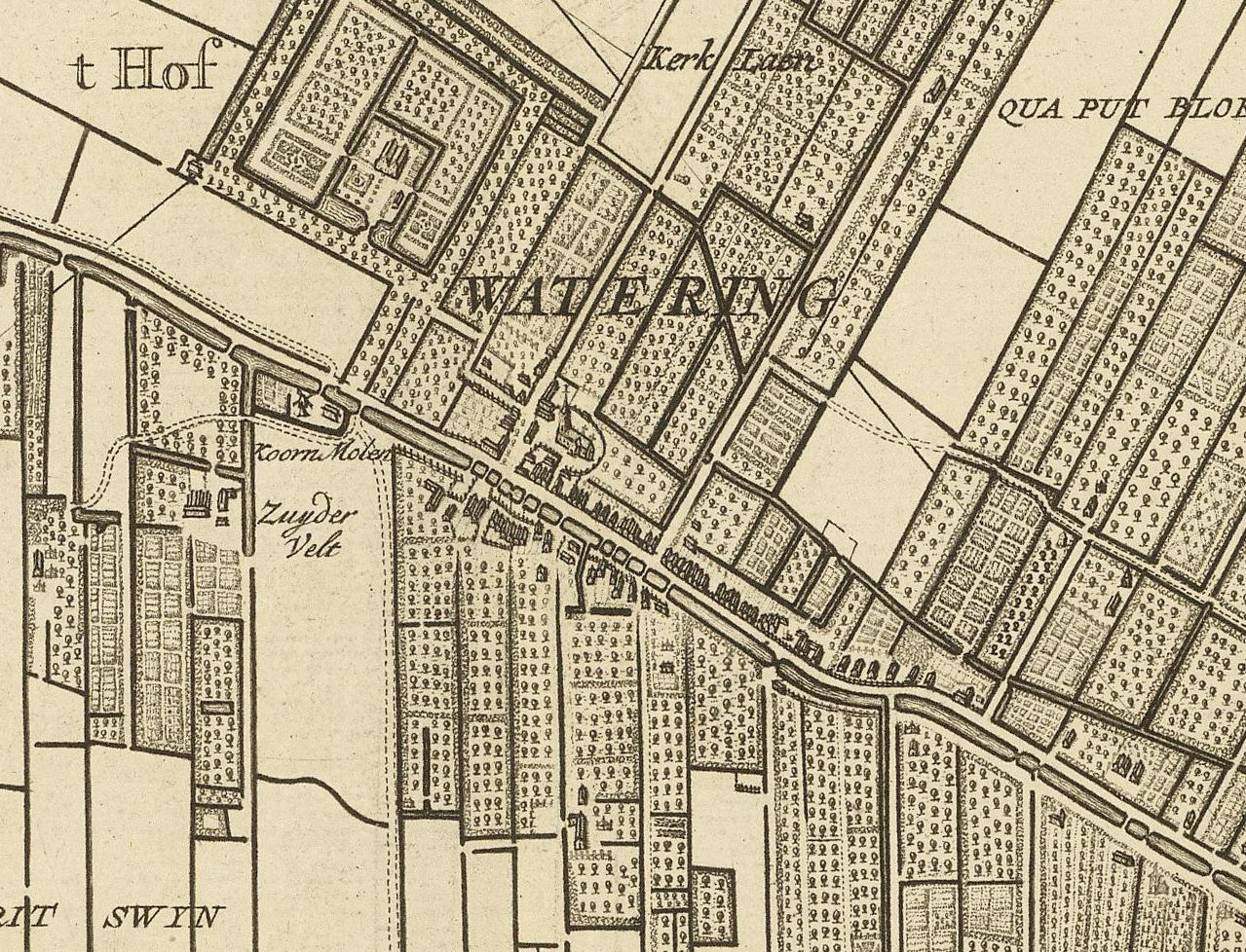 Kaart van het hoogheemraadschap van Delfland, gemeten door de landmeters Nicolaas en Joacobus Kruchius. Afgebeeld is Wateringen, Zuid-Holland